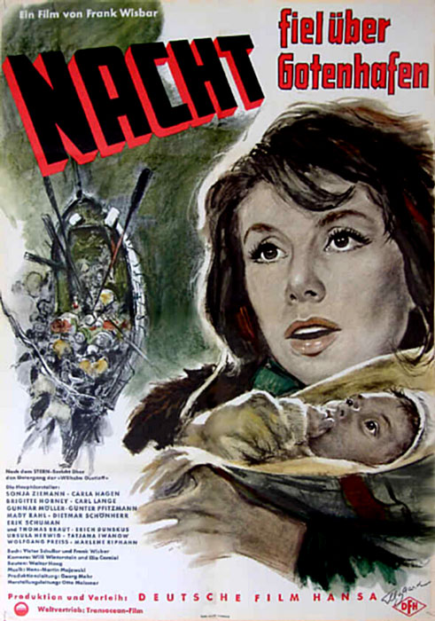 Filmplakat zum Film: "Nacht fiel über Gotenhafen"